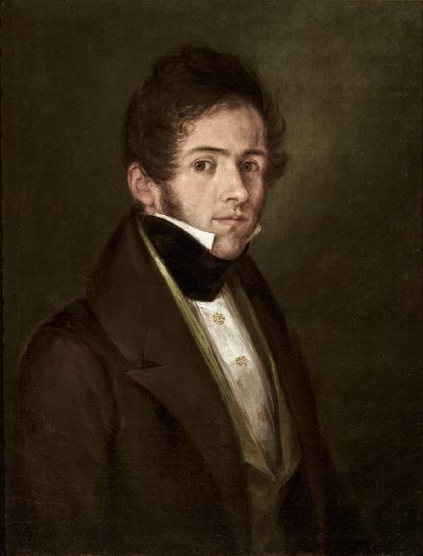 Retrato del pintor español José Domíguez Bécquer (1805-1841), que fue el padre del célebre escritor Gustavo Adolfo Bécquer y del pintor Valeriano Domínguez Bécquer.